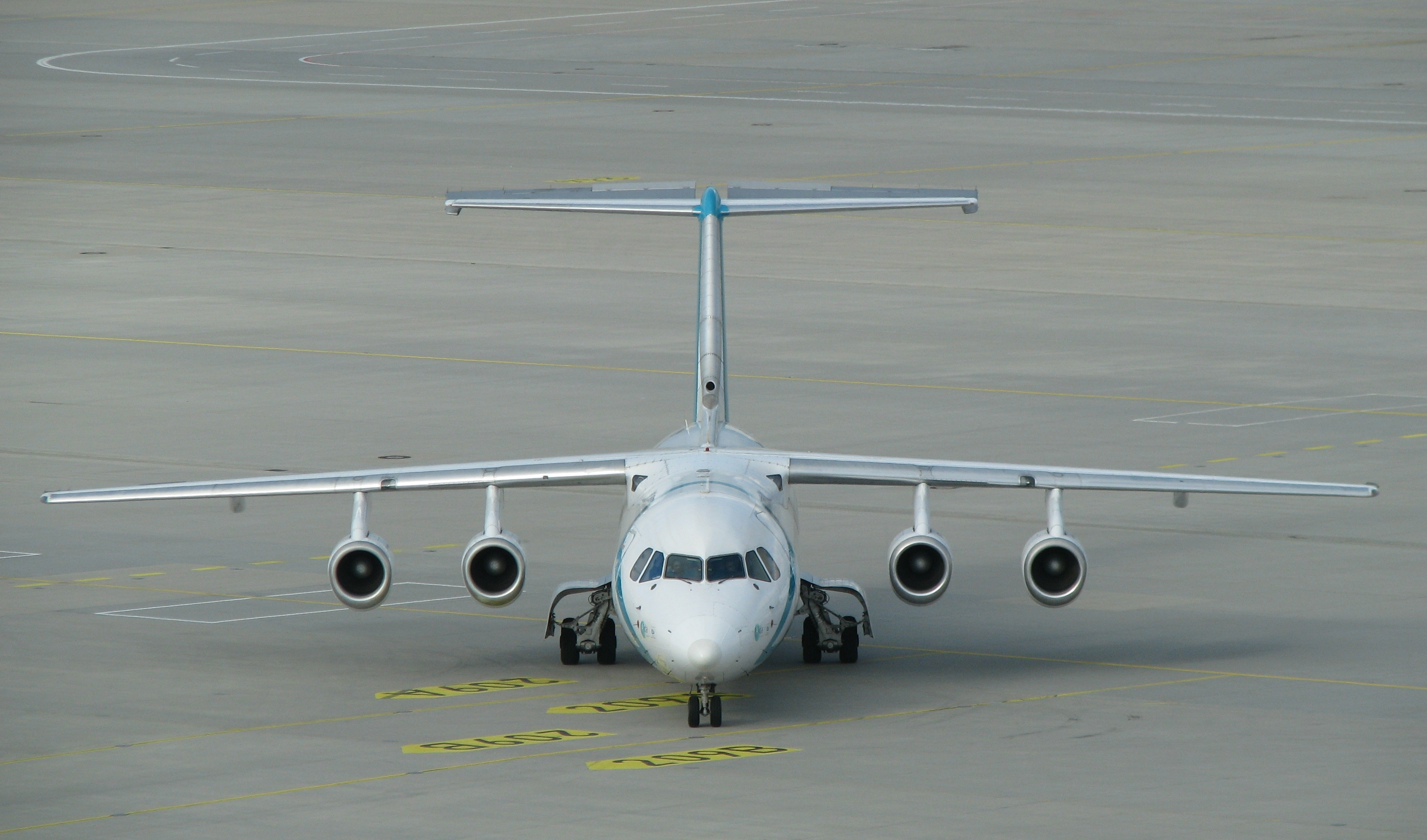 vierstrahlige BAE-146-300 der Air Dolomiti Luftfahrzeugkennzeichen I-ADJF in München (MUC)